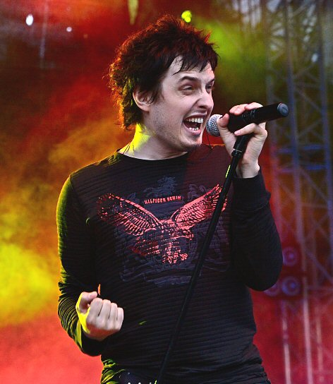 Bracia Cugowscy, Dzień Hutnika, Częstochowa 2008